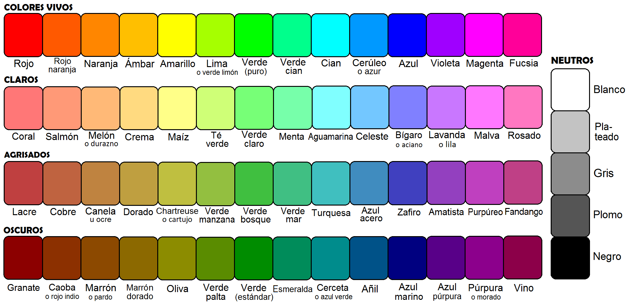 Tabla de colores